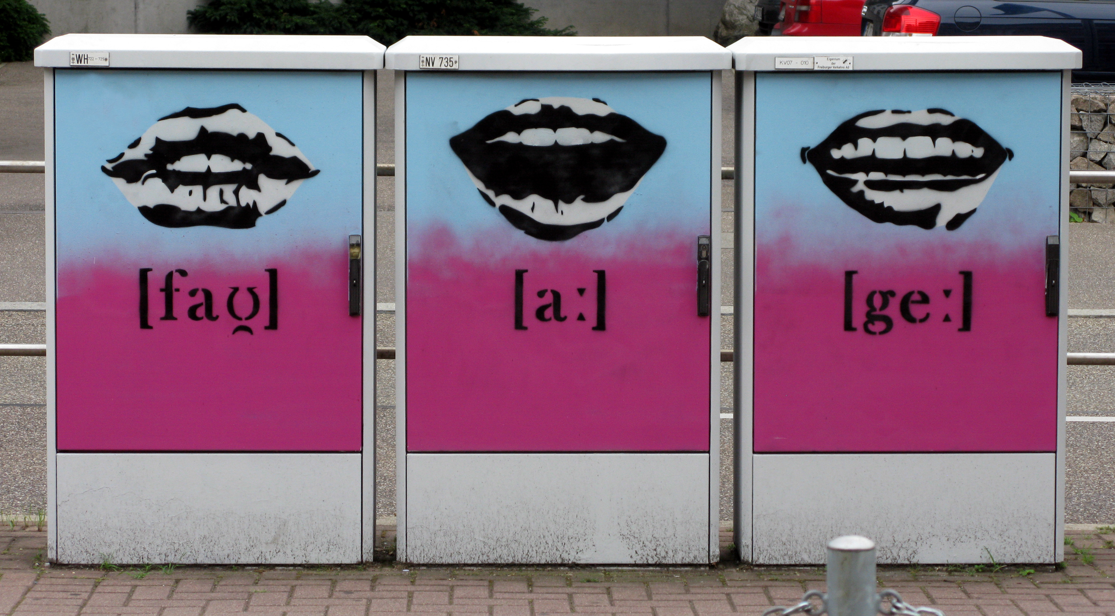 Verteilerkästen der Freiburger Verkehrs AG, von Studierenden der Hochschule für Kunst, Design und Populäre Musik Freiburg verziert, hier an der Haltestelle Heinrich-von-Stephan-Straße